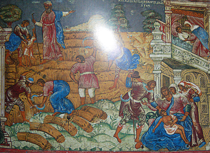 Гурий Никитин. "Жатва" (1681).